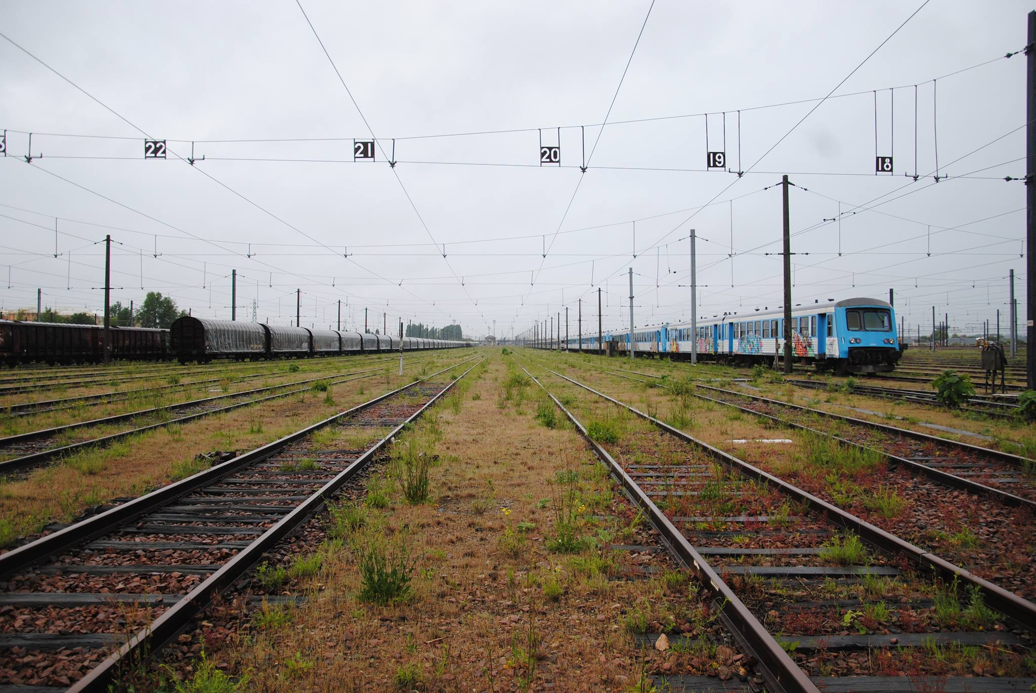 Des voies de garage de la SNCF près du technicentre de Saint-Pierre-des-Corps.